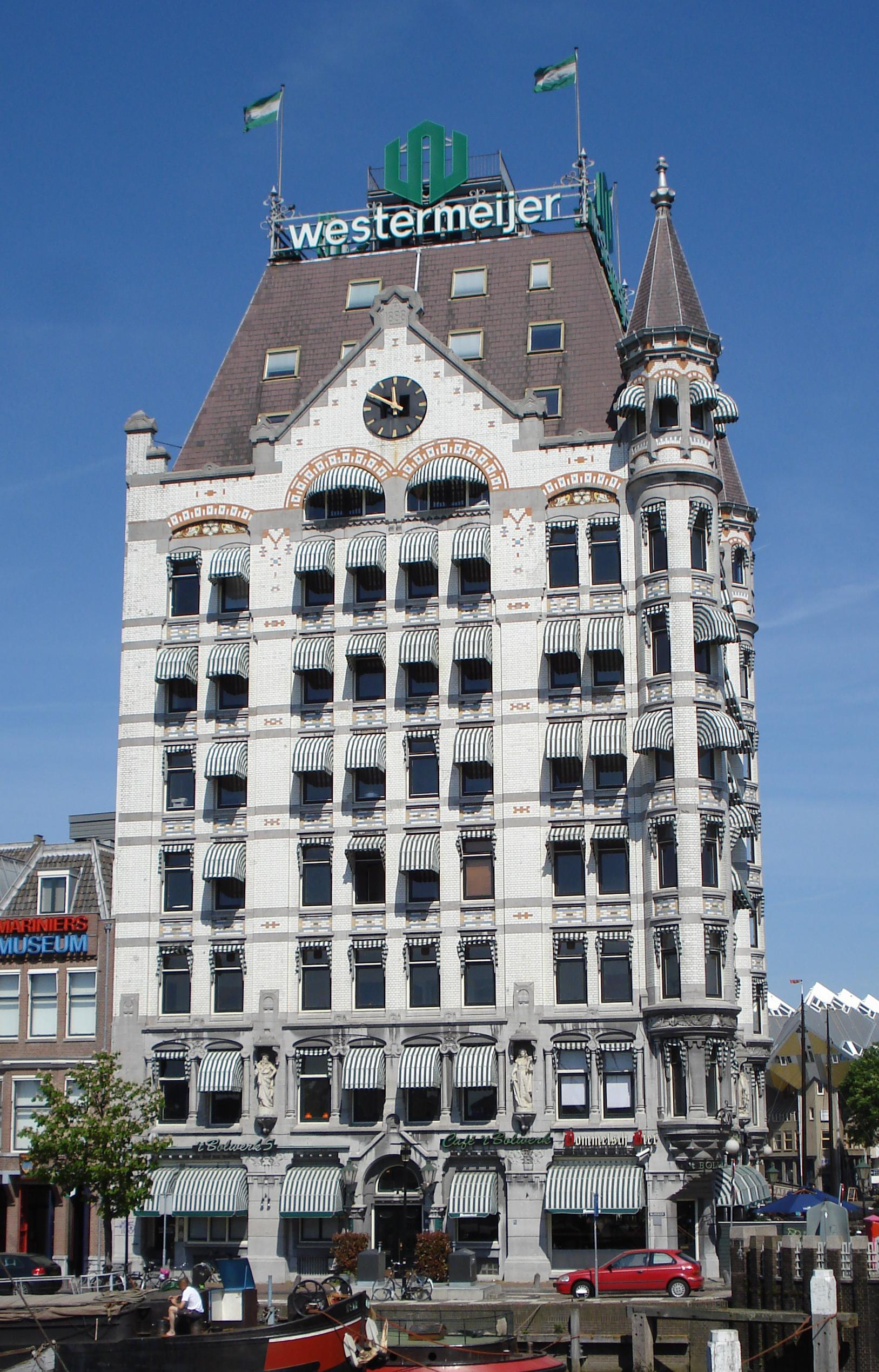 Rotterdam, Het Witte Huis. Rijksmonument.